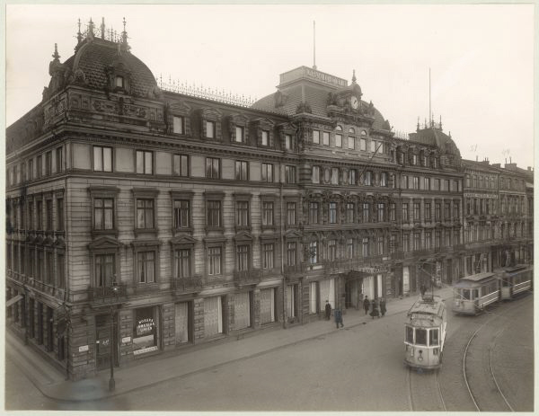 Grand Hotel Haglund, Göteborg. Exterior